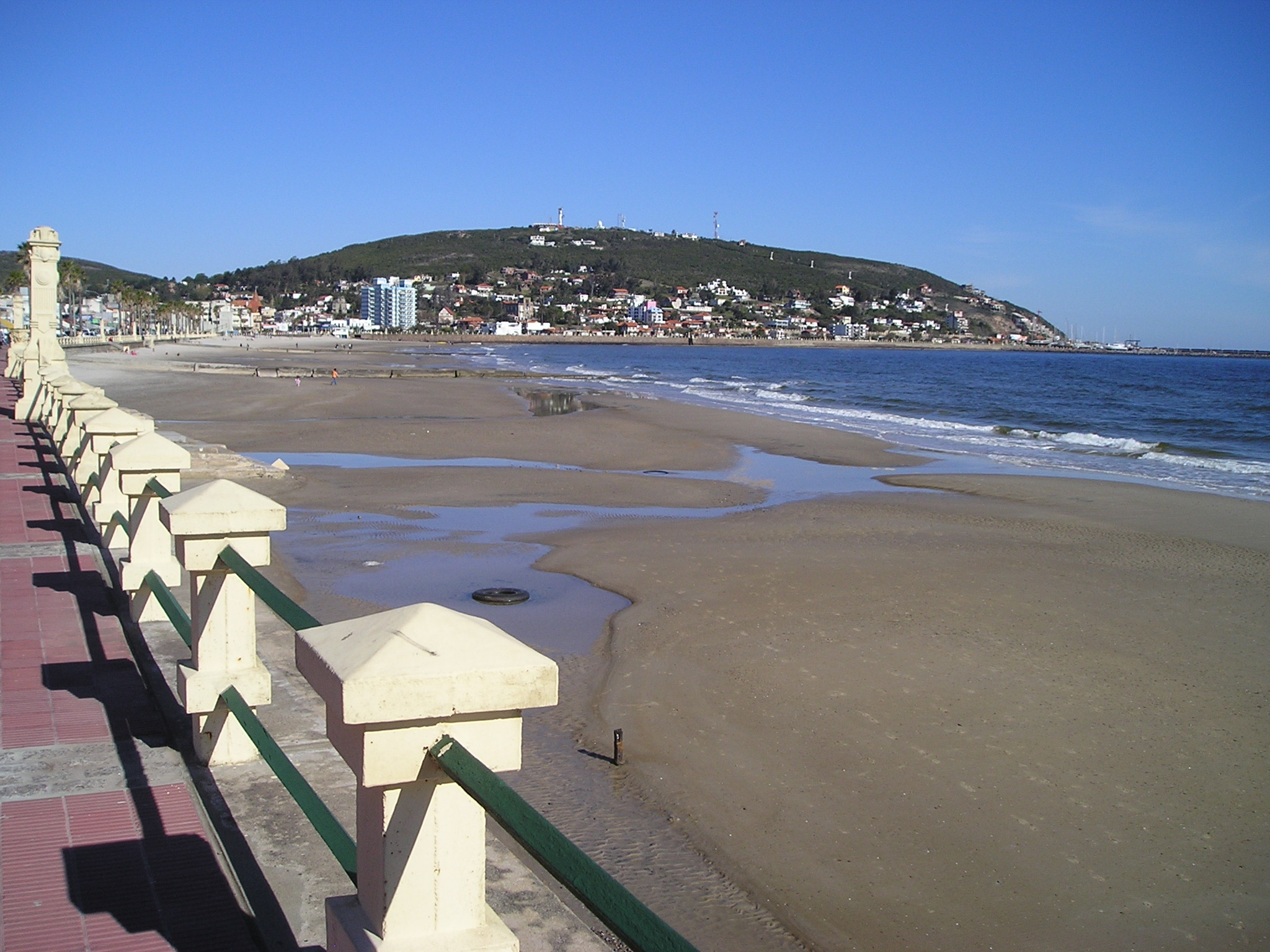 Piriápolis (Maldonado)